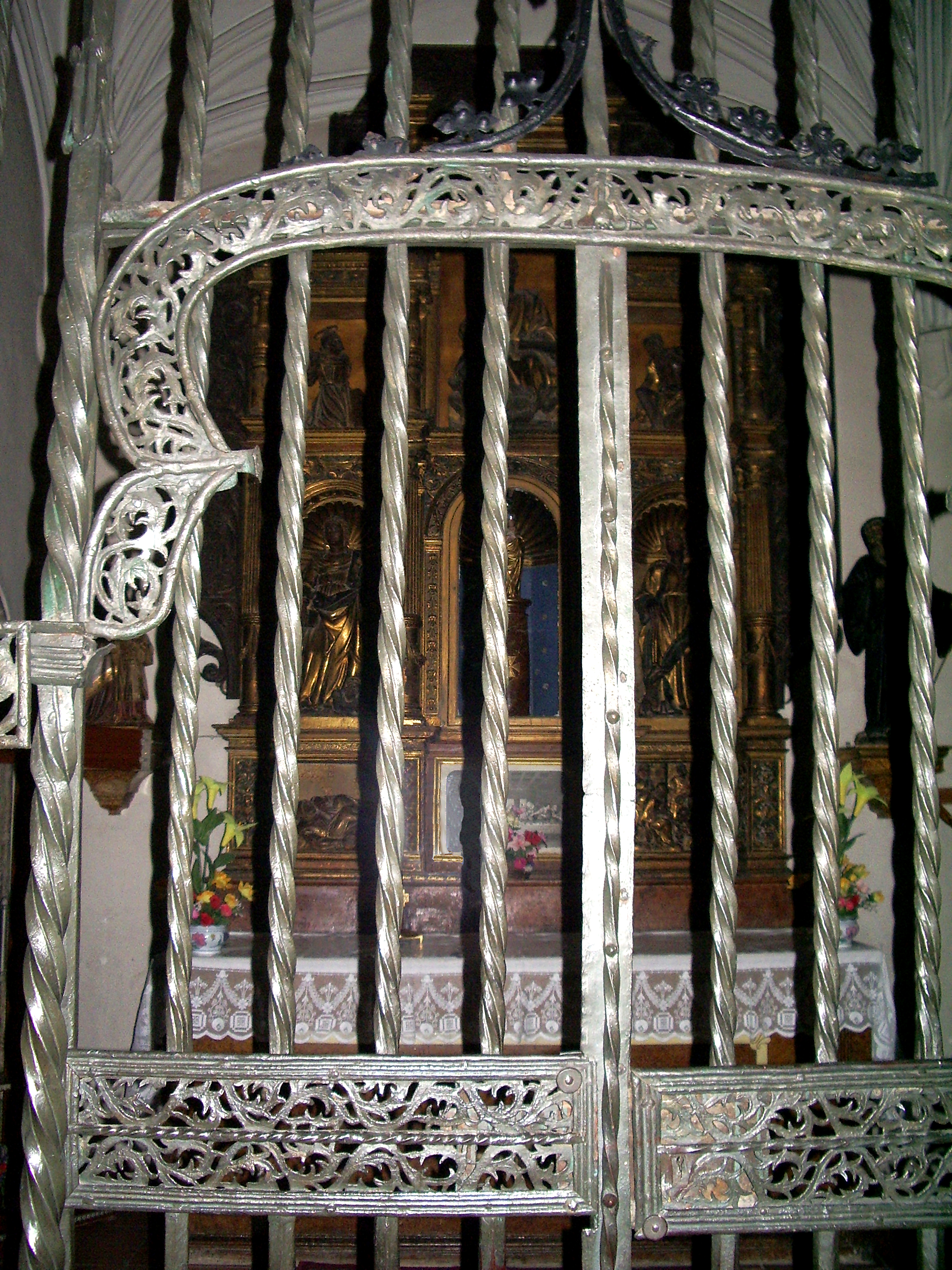 Detalle de la rejería tardogótica de la Capilla de la Virgen del Pilar (antigua capilla del Corpus) de la Iglesia de San Pablo de Zaragoza. 1529, talleres de Jaime Tejedor. Estilo: gótico.